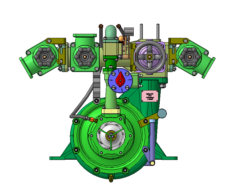 Насос пожарный, центробежный вид спереди